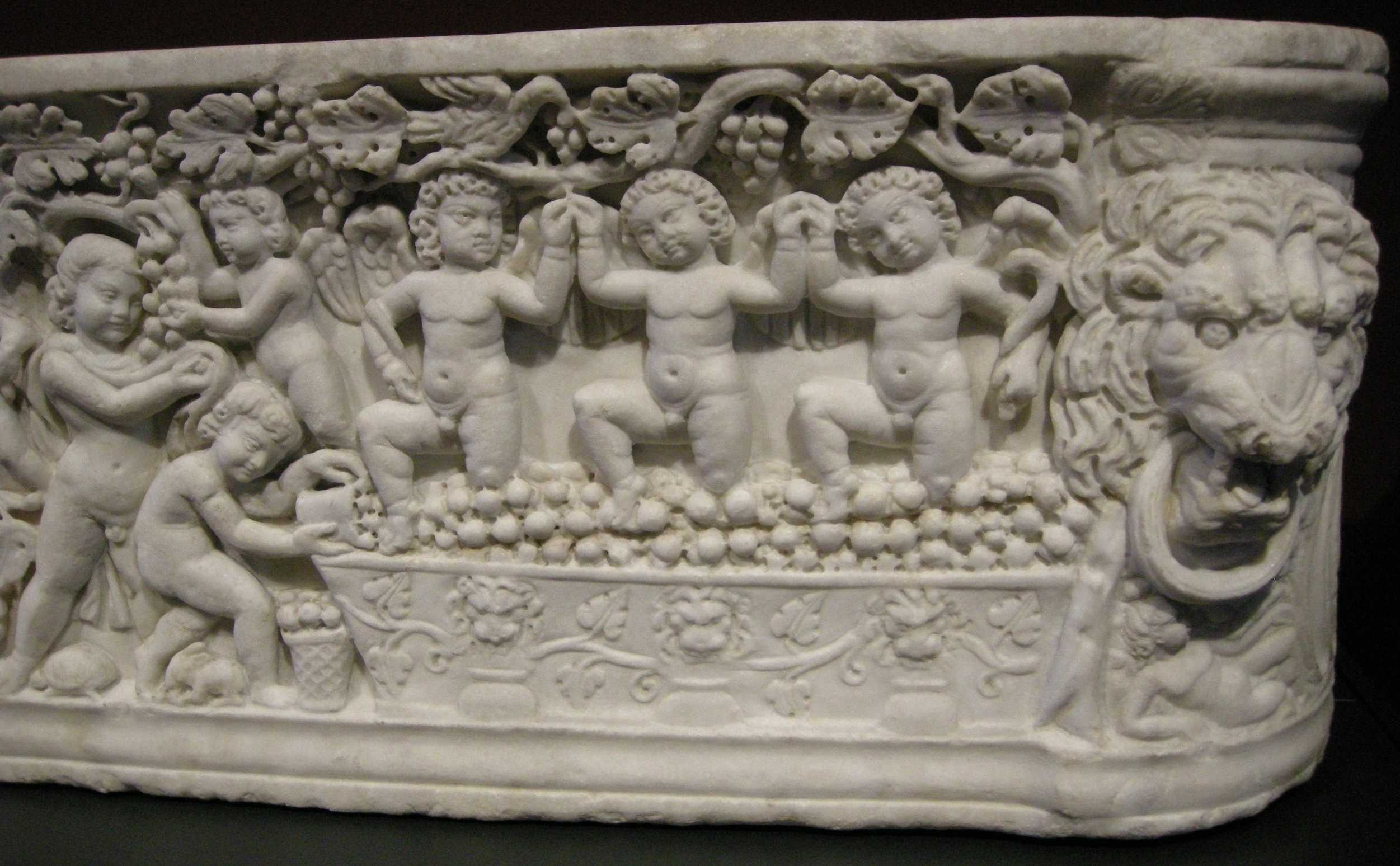 Arte romana, sarcofago con scene di vendemmia, 290-300 ca.